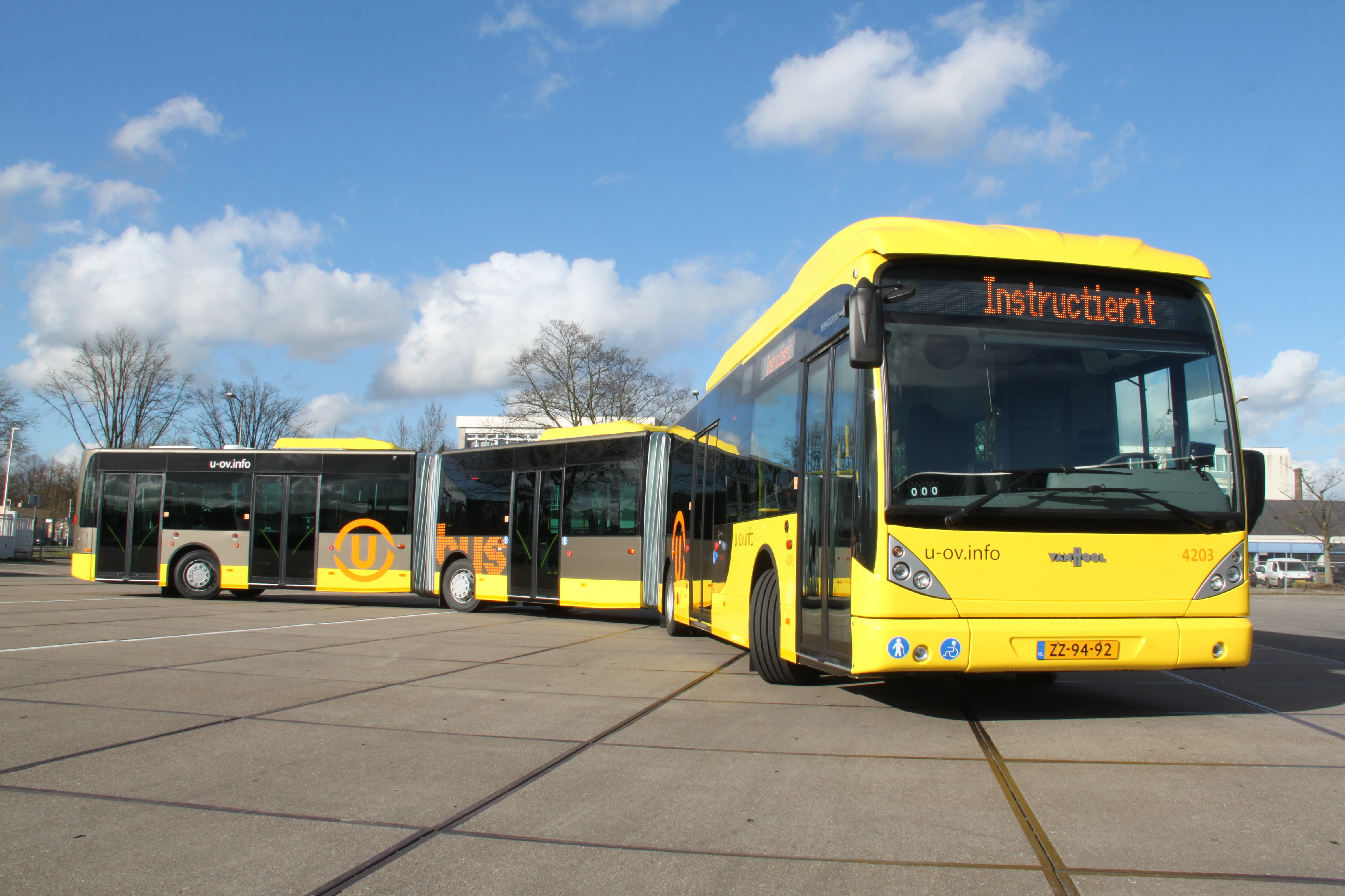 Qbuzz/U-OV 4203 op de Europalaan, Utrecht.